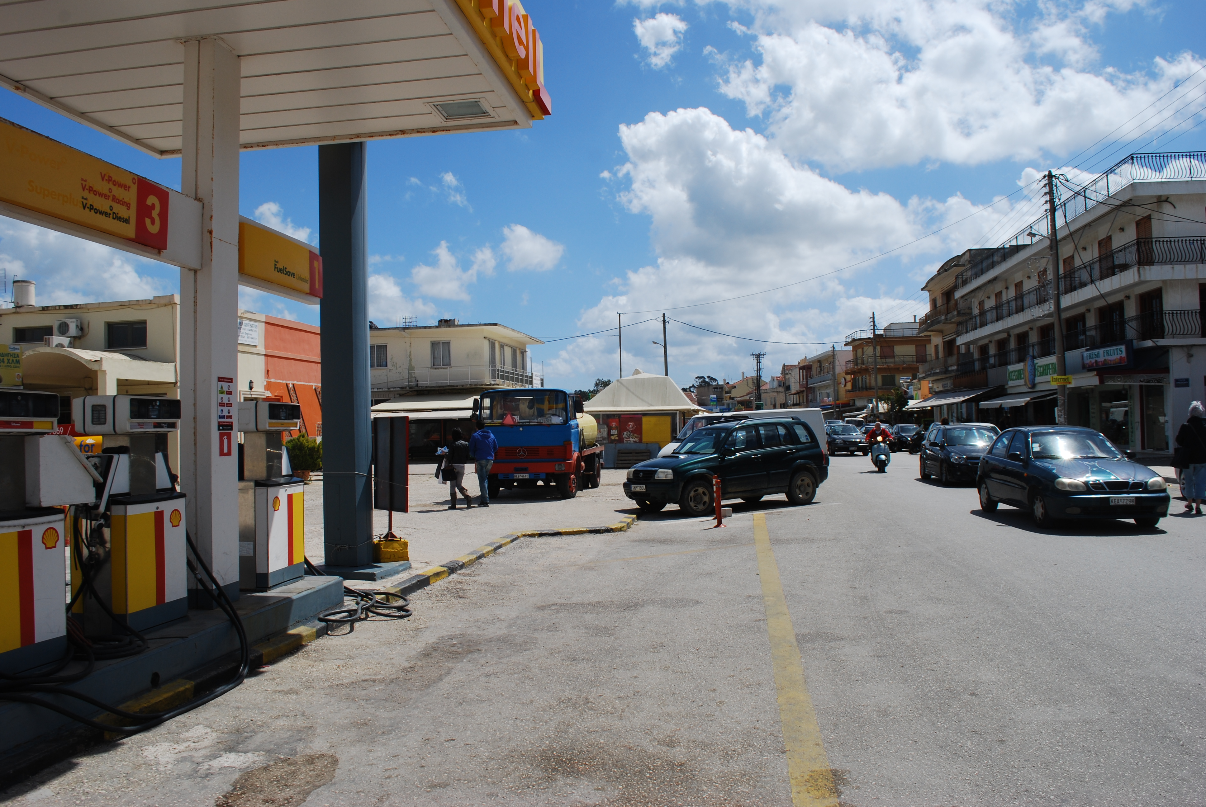 Vue d'Argostoli (Kefalonia).